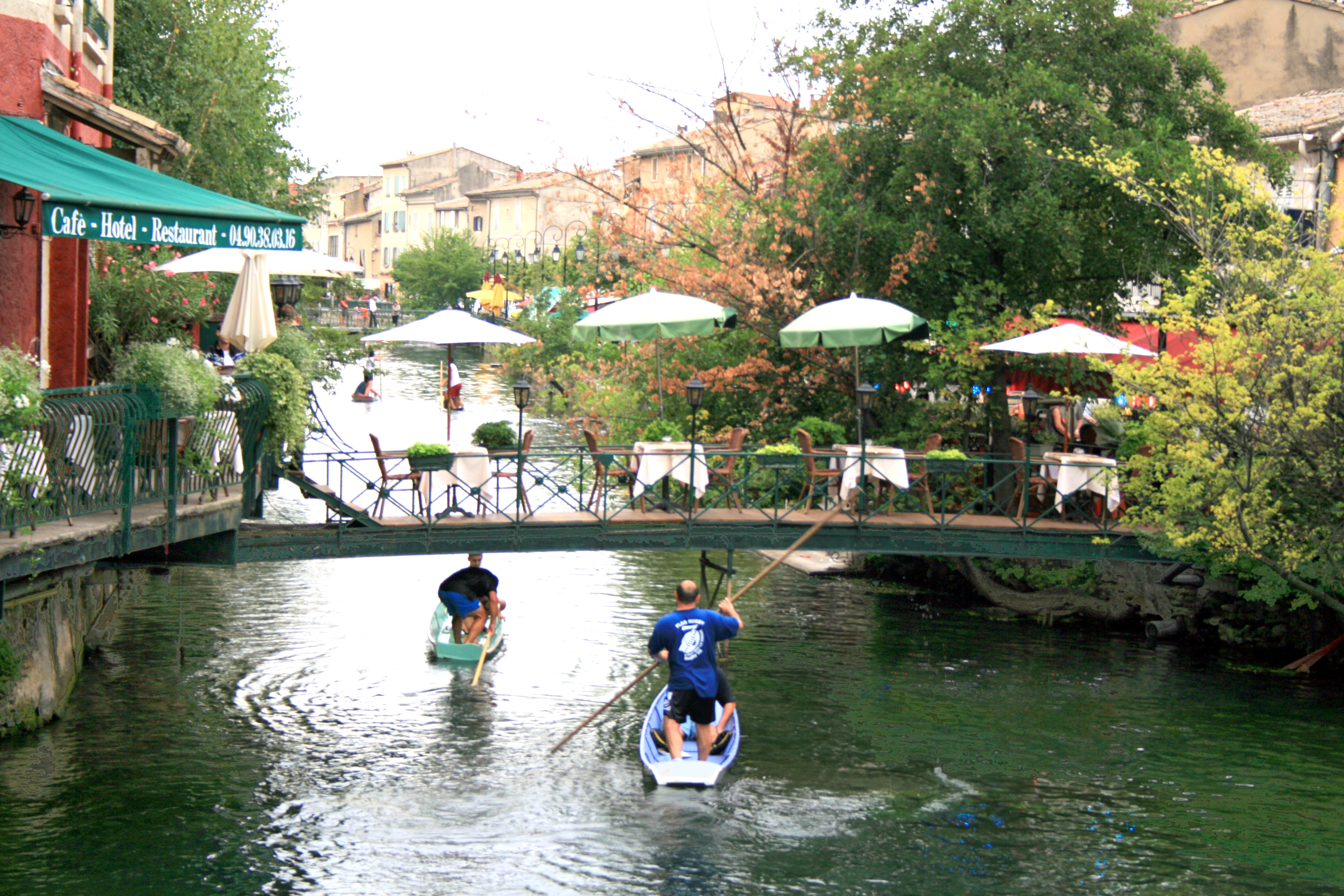 L'Isle-sur-la-Sorgue. Nego-chin : barque à fond plat